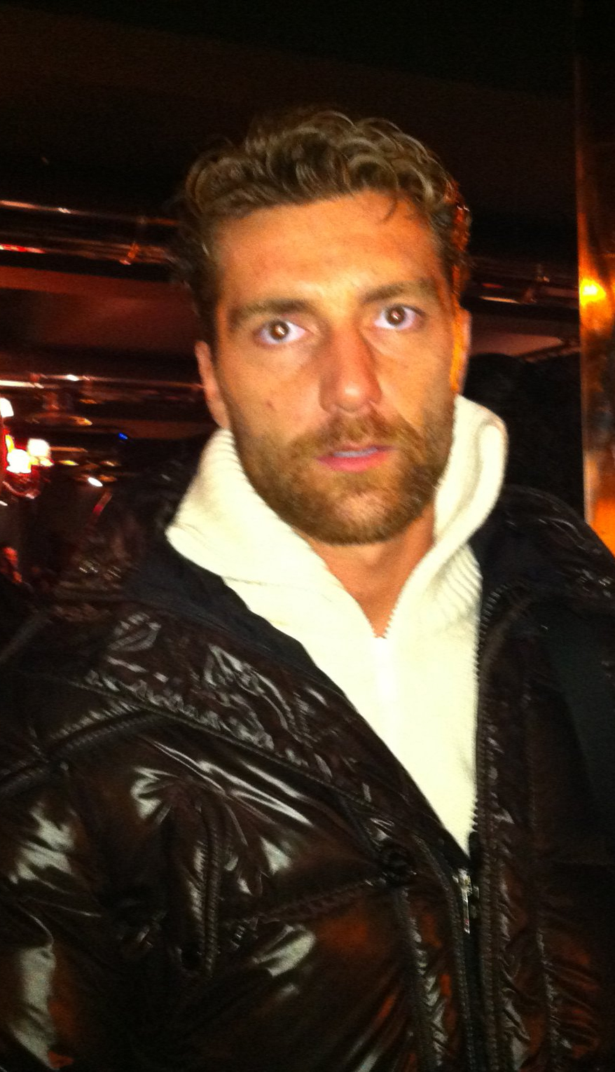 Morgan De Sanctis con i suoi fan